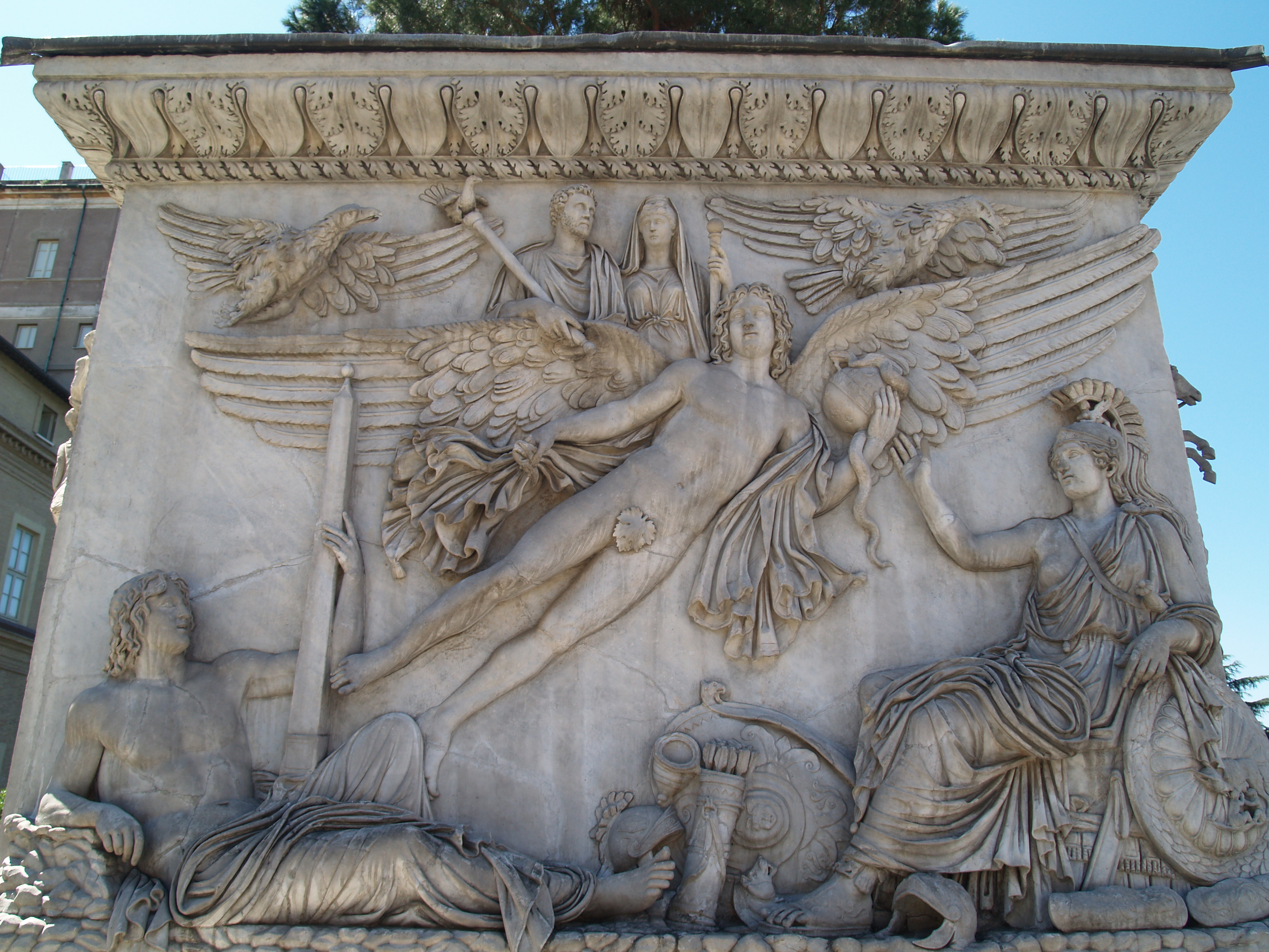 Columna de Antonino Pío. Museos Vaticanos.